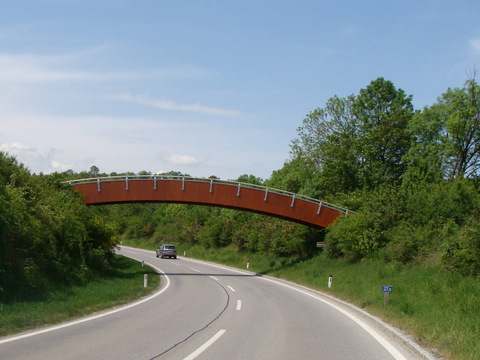 Römerwegbrücke über die Bundesstraße 6 - Laaer Straße